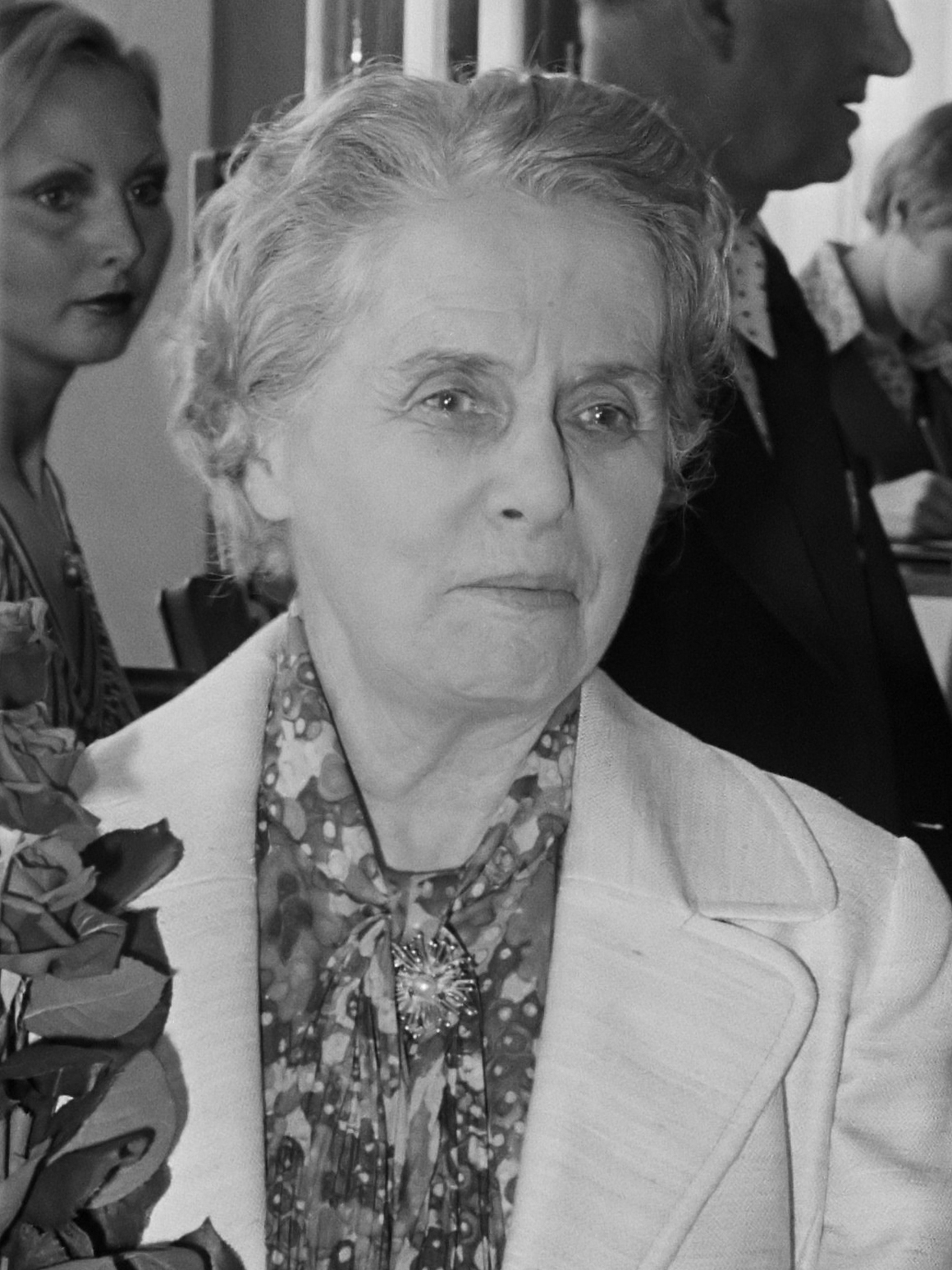 Aankomst choreografe Dame Ninette de Valois op Schiphol 20 juni 1974